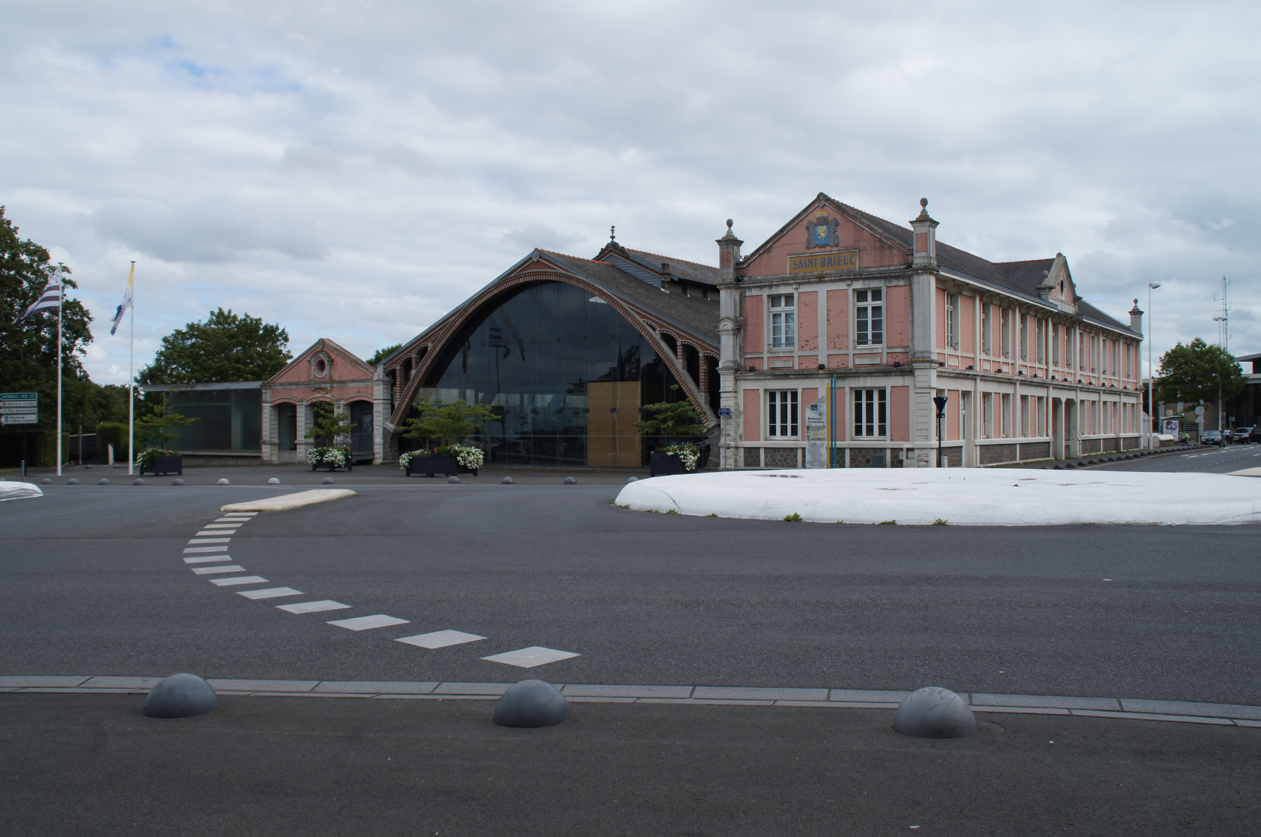 Der ehemalige Bahnhof der früheren Departementalbahnen in St Brieuc, seit 1994 als Restaurant der Universität in Verwendung